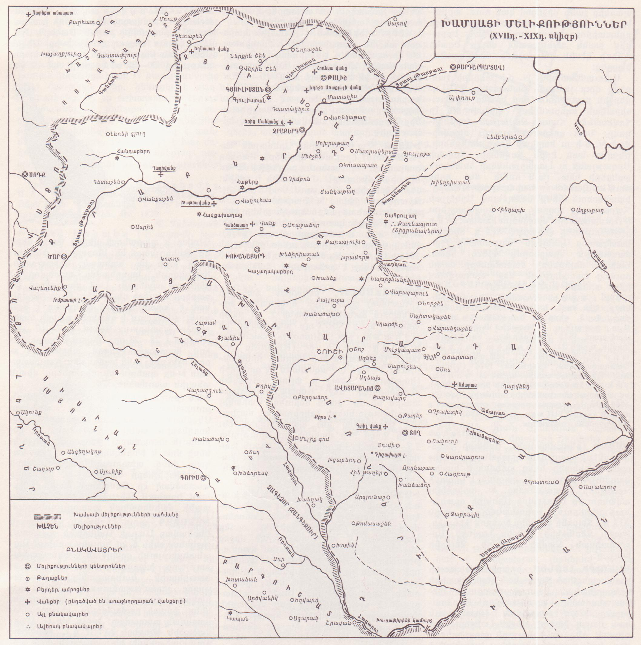 Խամսայի մելիքությունները XVII-XIX դարերում